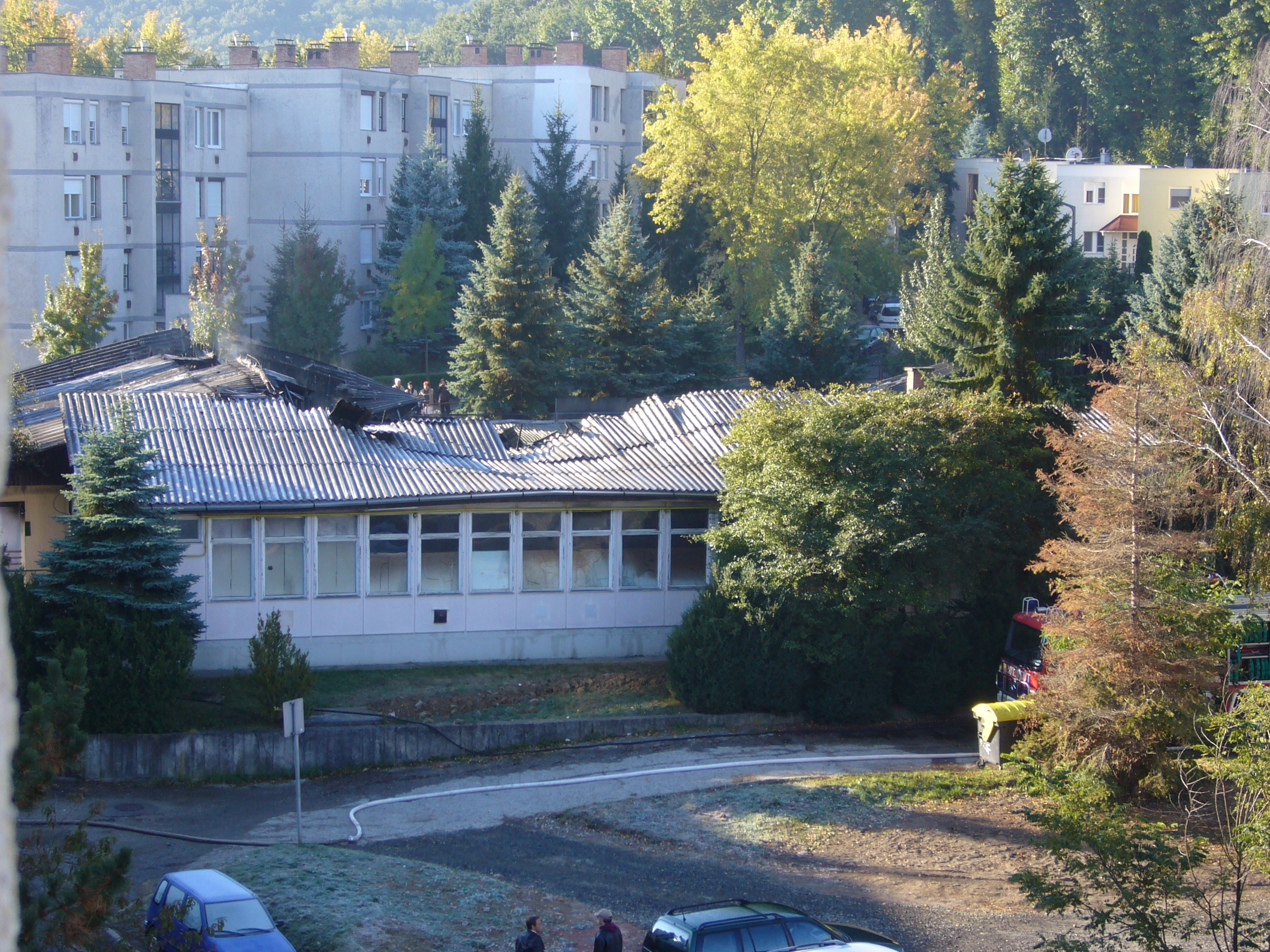 A leégett Salgótarjáni Csokoládégyár a tűzeset másnapján.